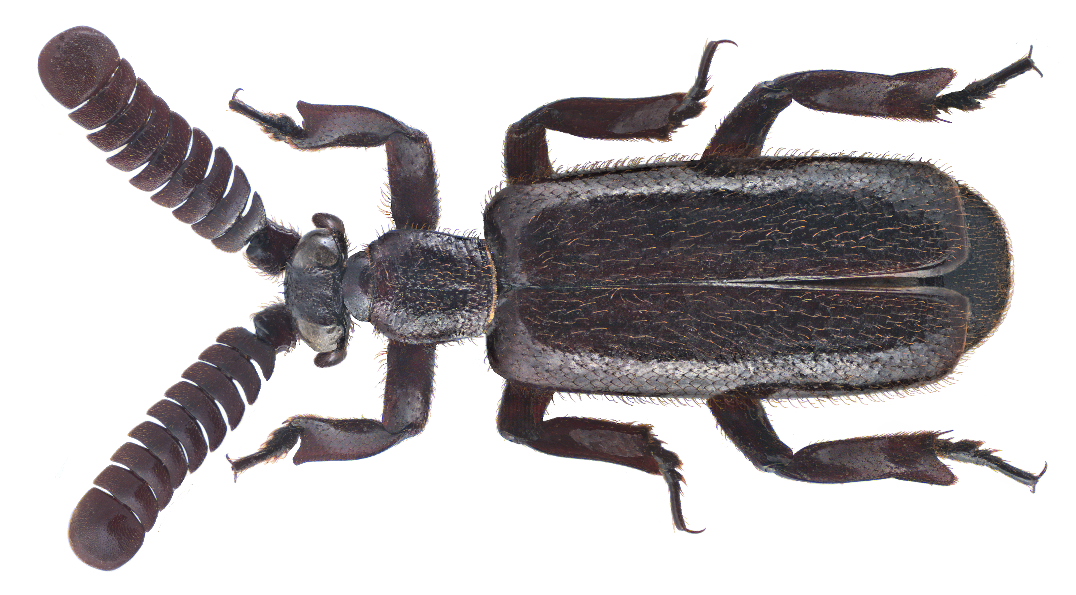 Family: Carabidae Size: 12,2 mm Location: Australia, Murray Sunset NP, Mt. Crozier leg. A.M.Sundholm, 24.X.2013; det. U.Schmidt, 2015 Photo: U.Schmidt, 2015